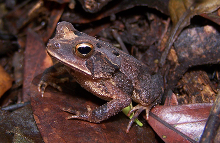 Bufo canaliferus